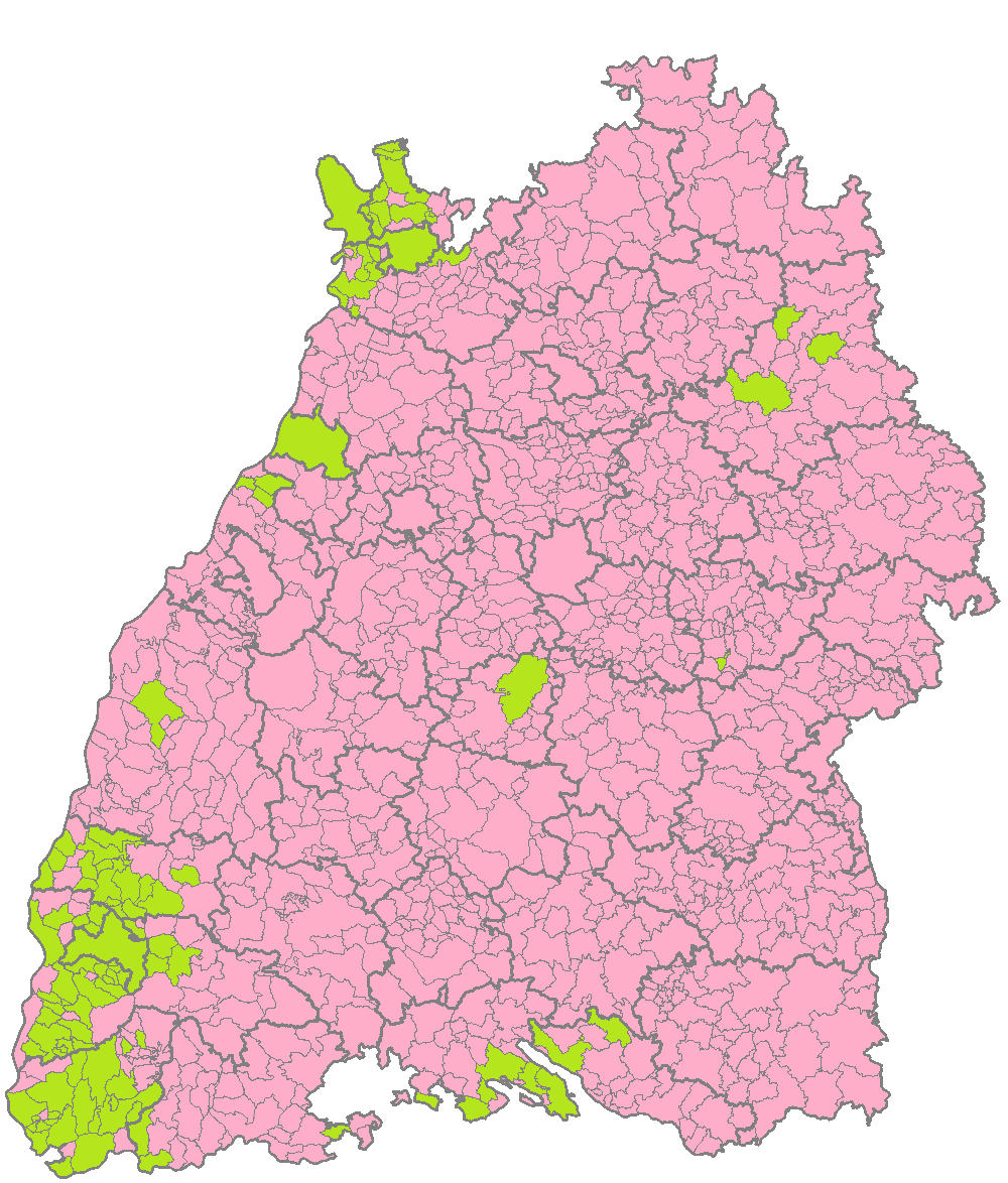 Verteilung der Ergebnisse der Volksabstimmung zu Stuttgart 21 pro Gemeinde (grün: Gesetzesvorlage mehrheitlich angenommen, rot: abgelehnt)